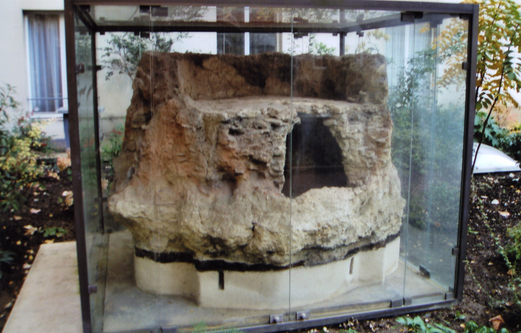 Four romain (rue de Vaugirard)